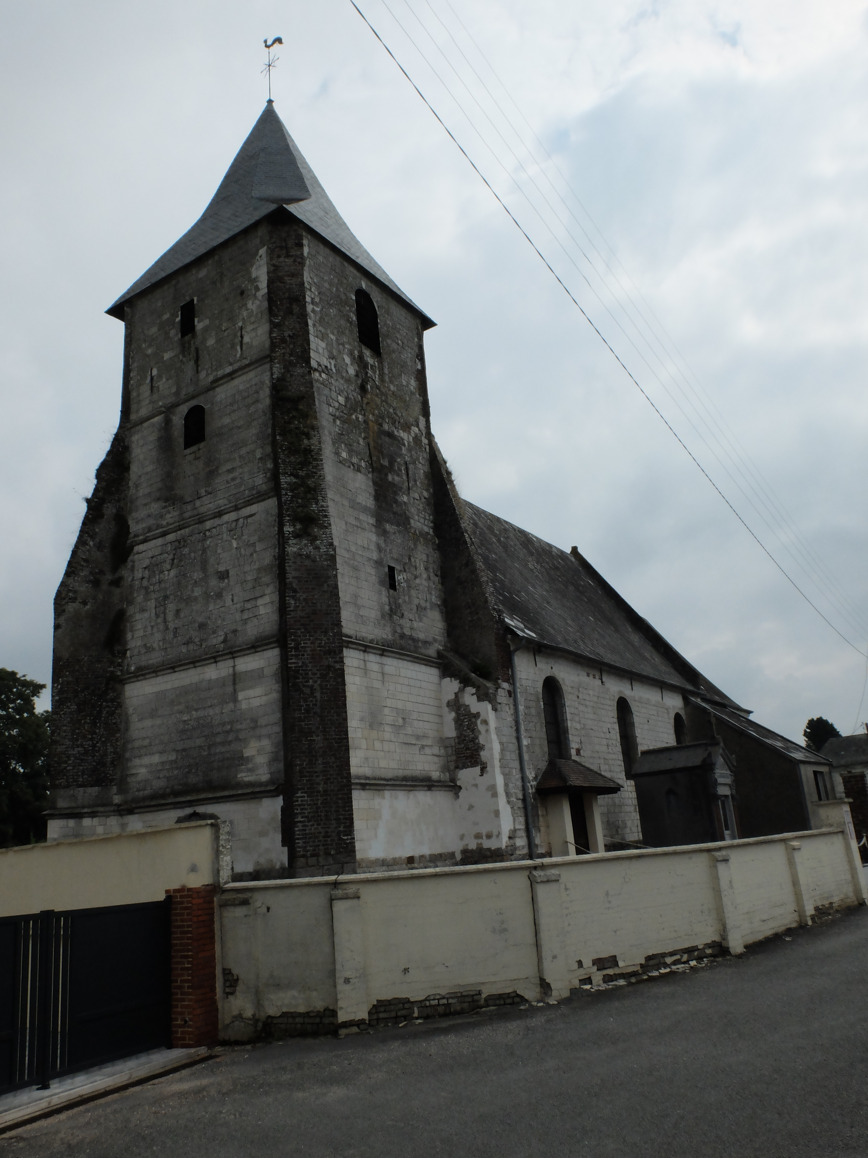 Vue de l'église Saint-Pierre de Bailleul-aux-Cornailles.